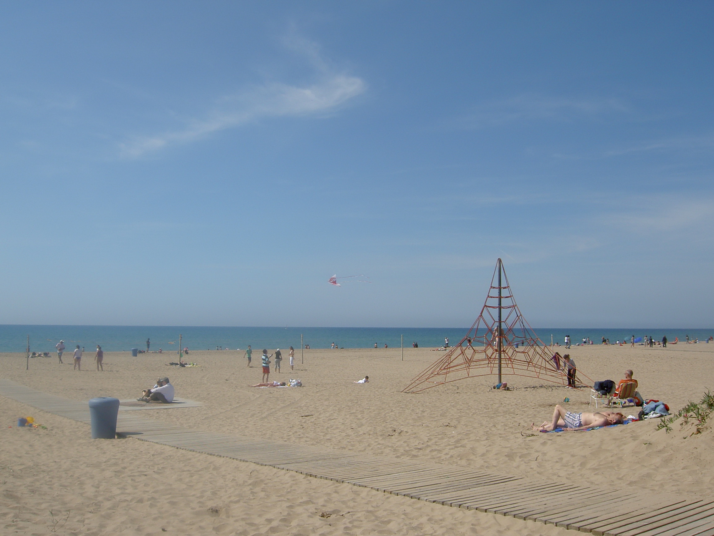 Platja de Gavà Mar